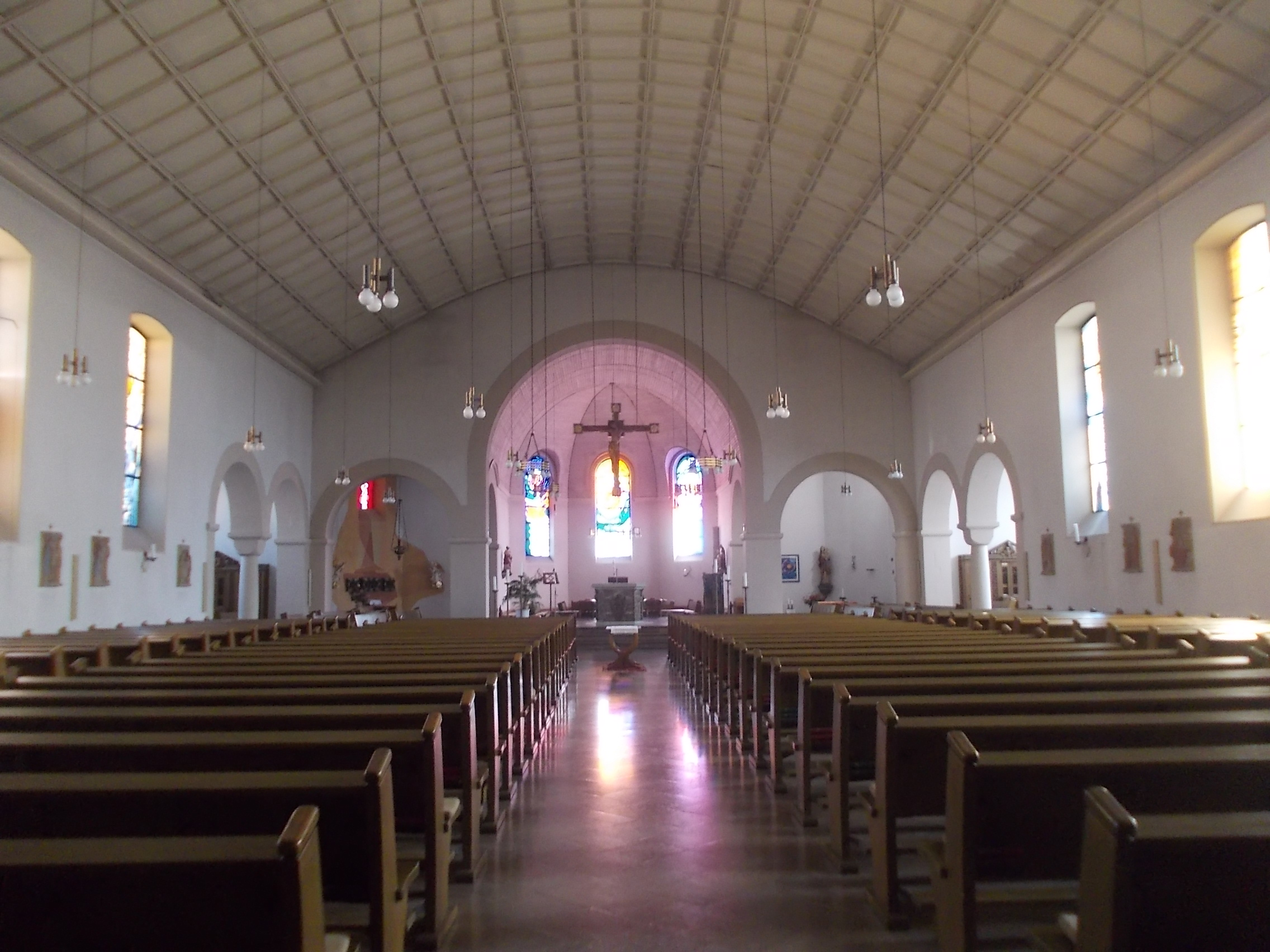 Innenraum der Fraulauterner Dreifaltigkeitskirche